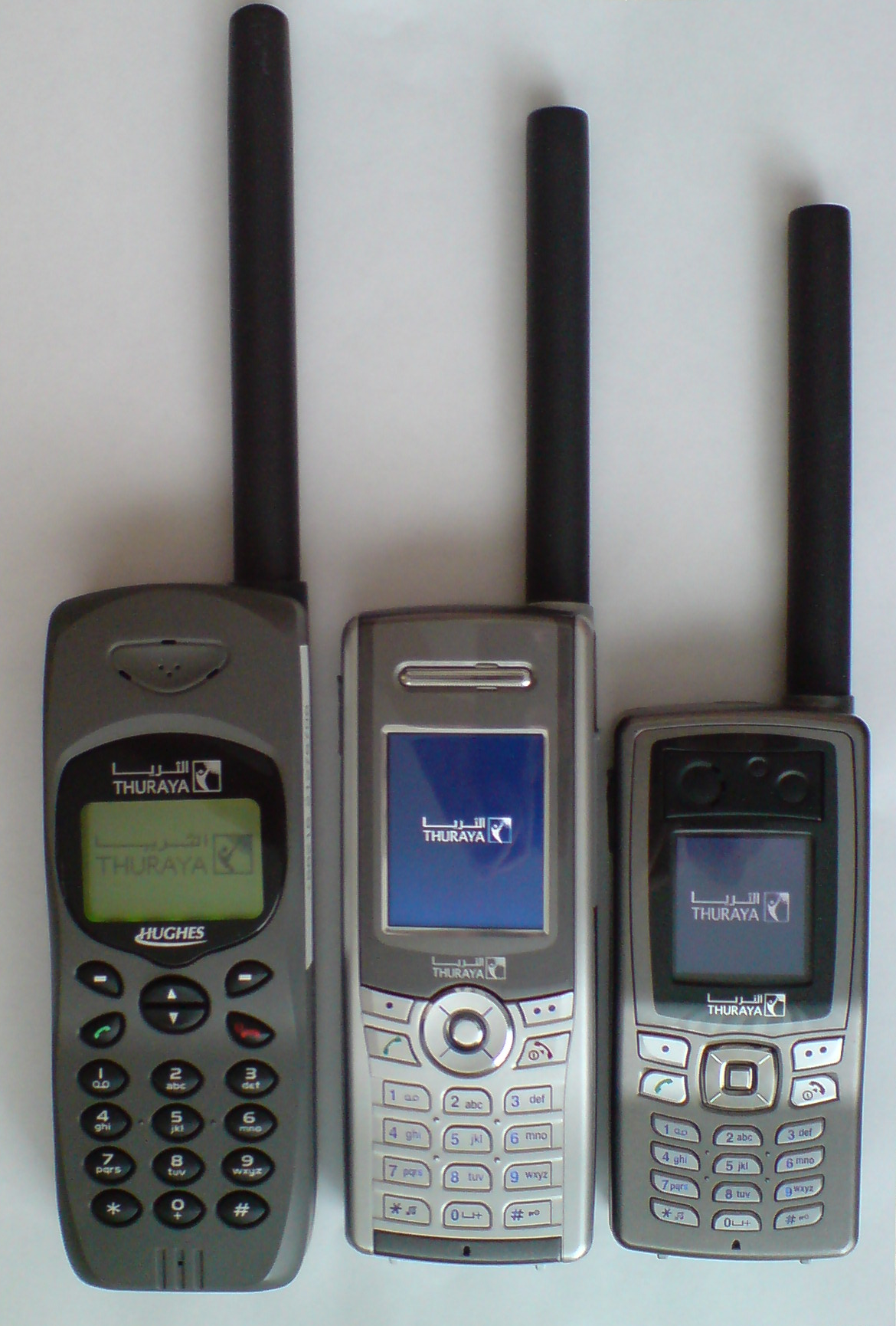 Drei Thuraya Satellitentelefone: Hughes 7101, APSI SG-2520, APSI-SO-2510